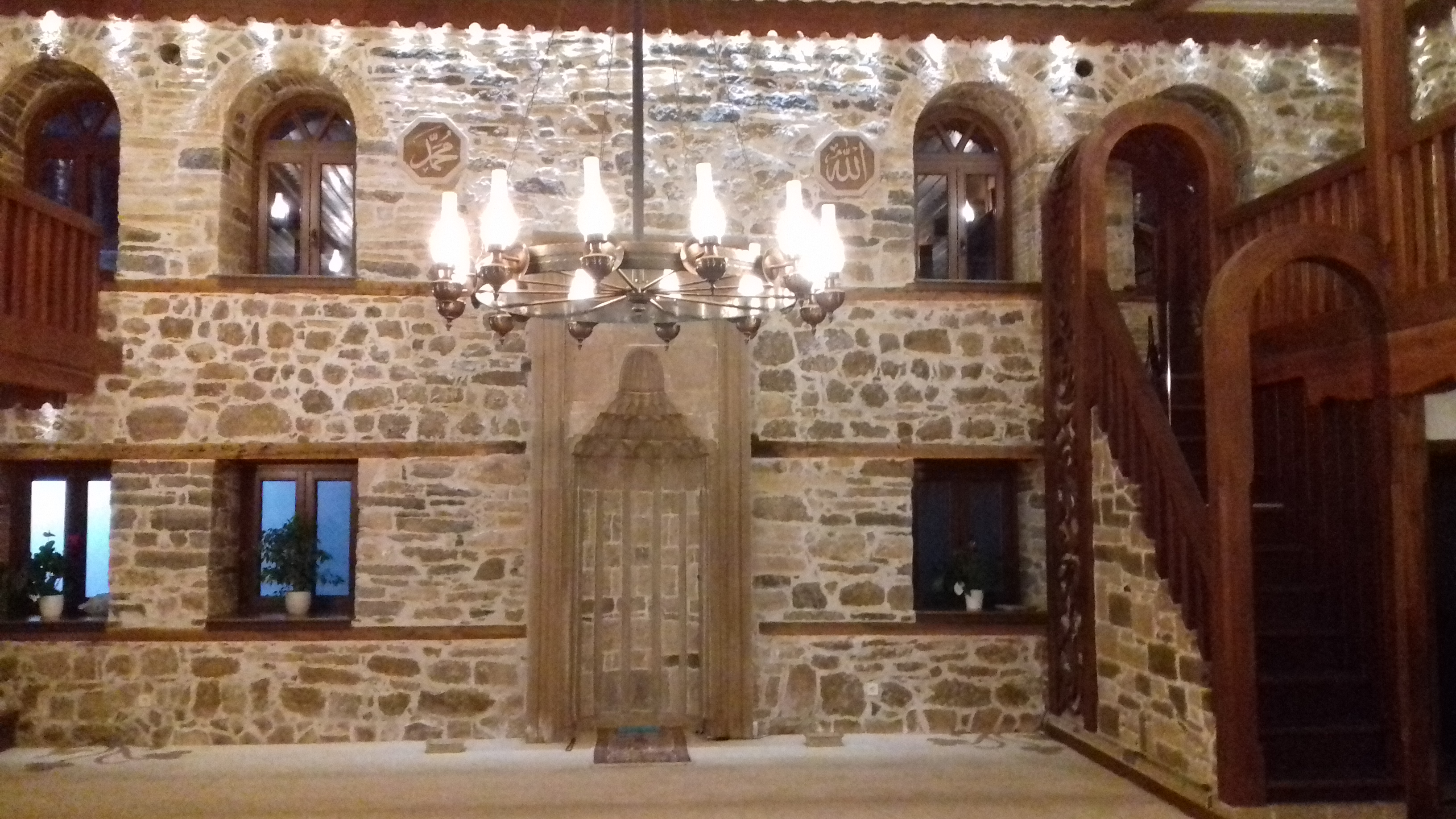 Чаршијска џамија у Зеници